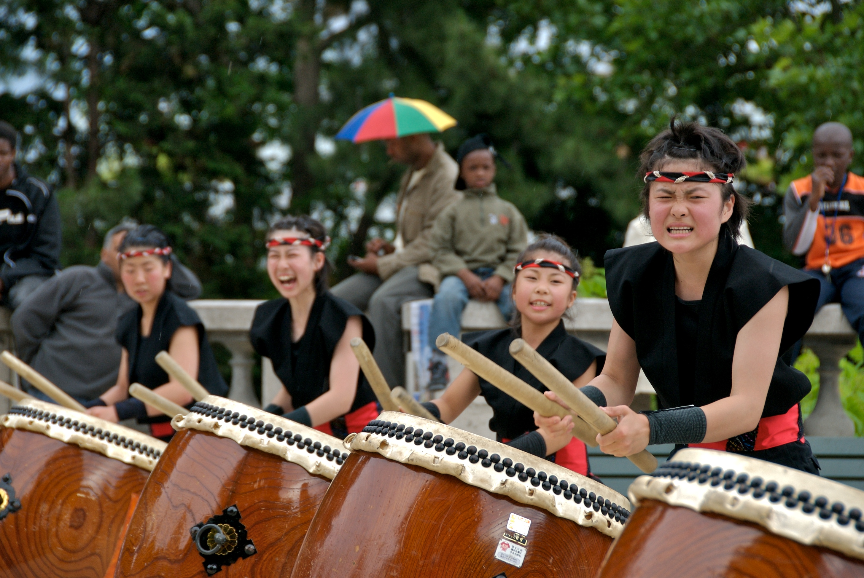 A little bit of culture exchange near the Basilique du Sacré-Cœur, Paris, France.